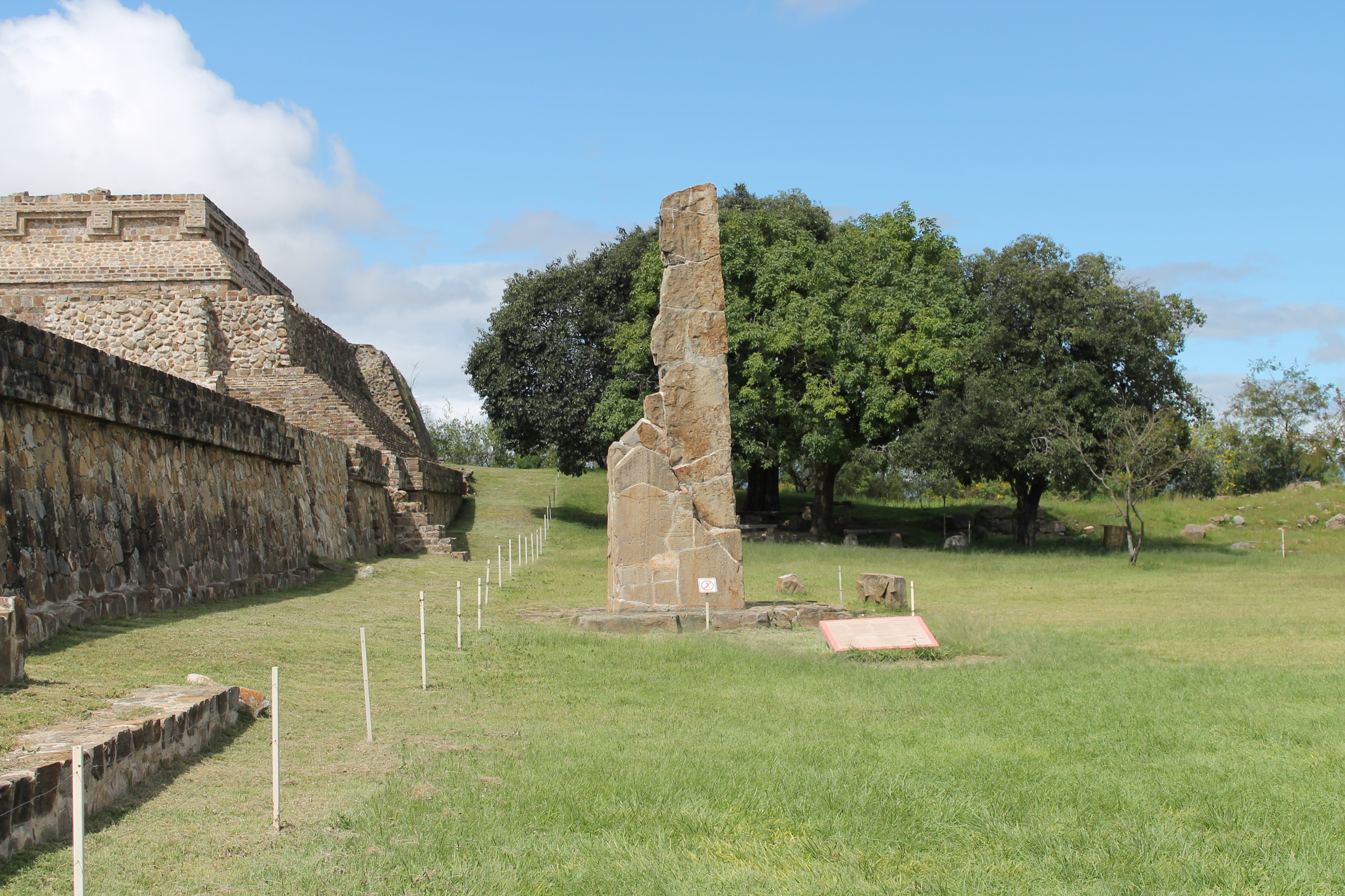 Se aprecia la Estela 18, una piedra de 5.80 metros tallada con símbolos de la cultura Zapoteca. En leguaje coloquial podría decirse que era utilizada como reloj de Sol.